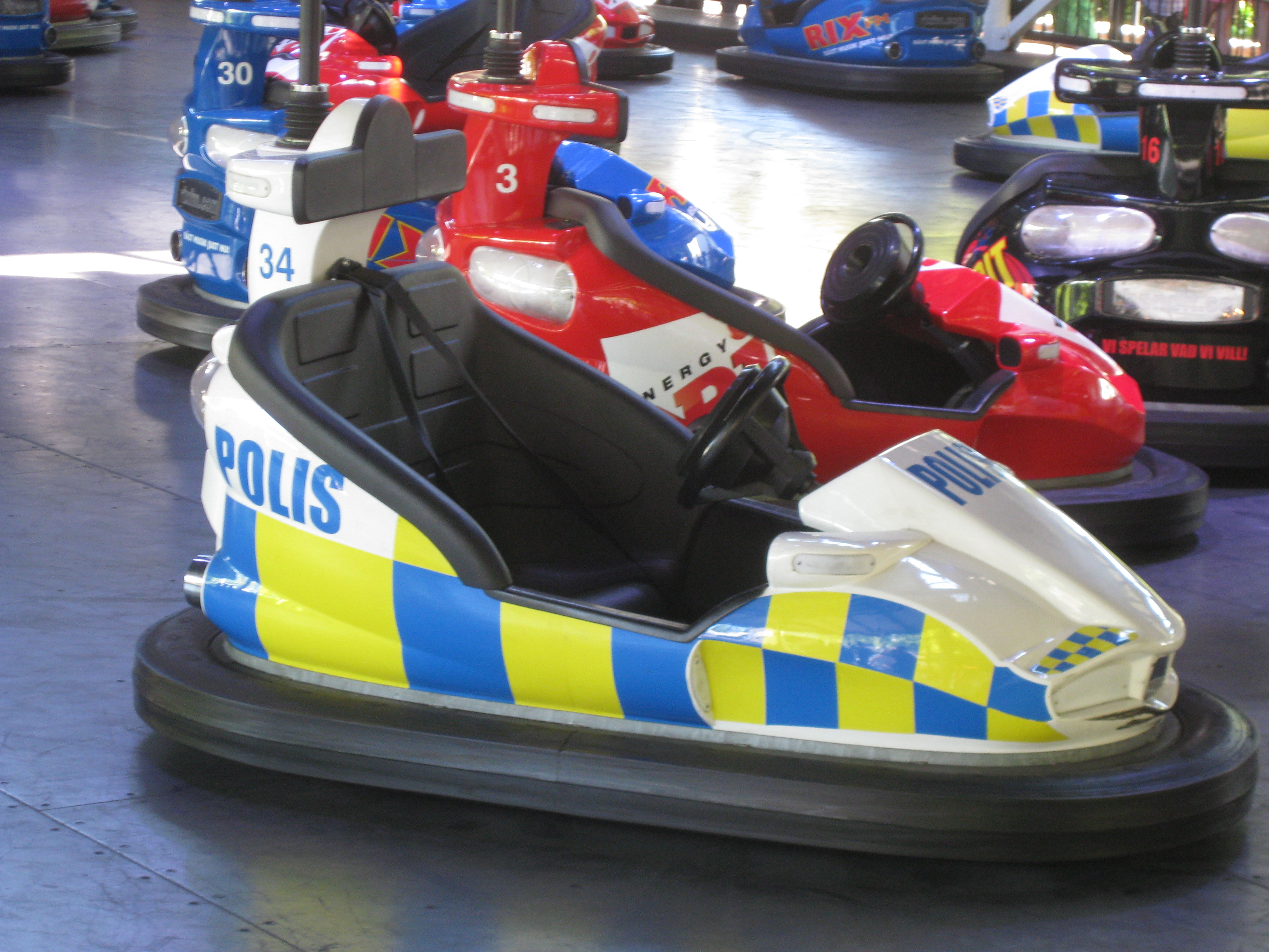 En radiobil i form av en polisbil. Liseberg, Göteborg 2012.